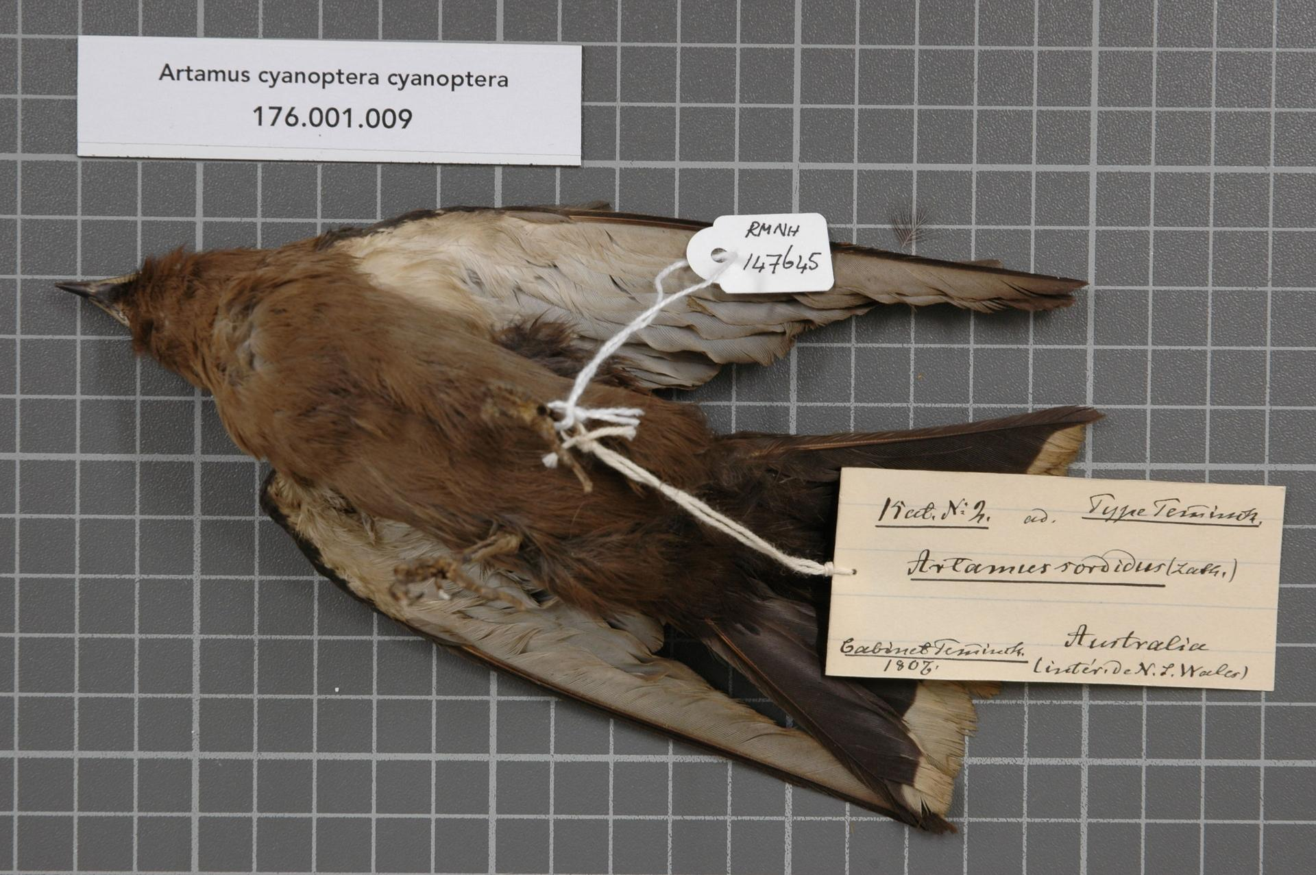 Artamus cyanoptera cyanoptera (Latham, 1801)